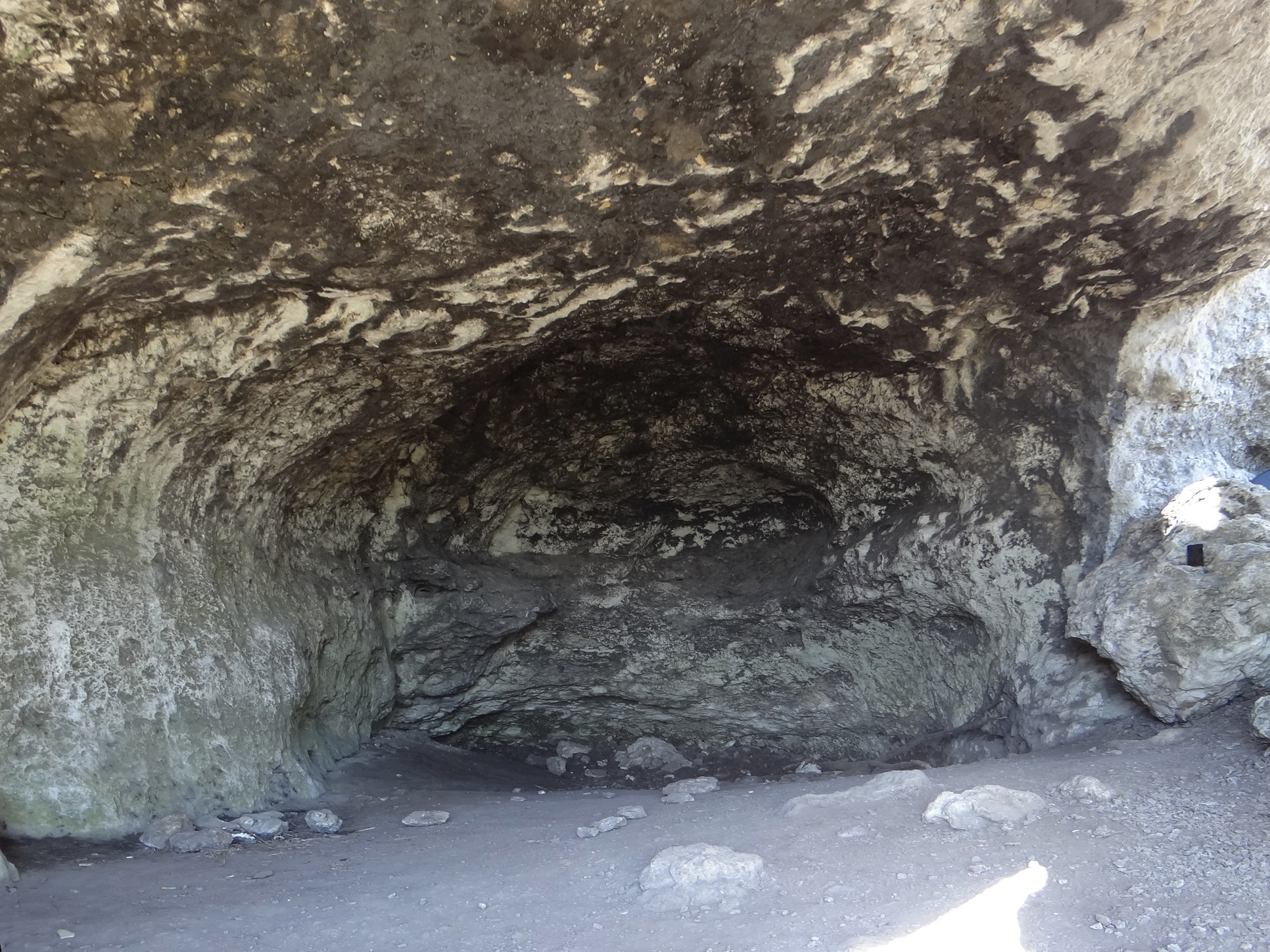 Formy skałkowe na Górze Zborów